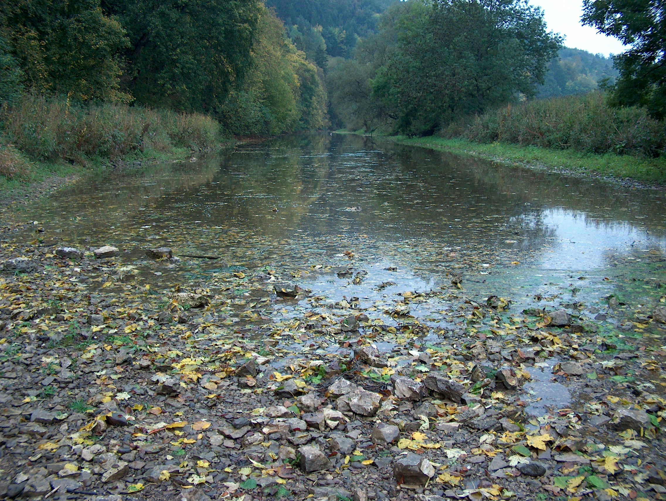 Donauversickerung bei Geisingen, Baden Württemberg.